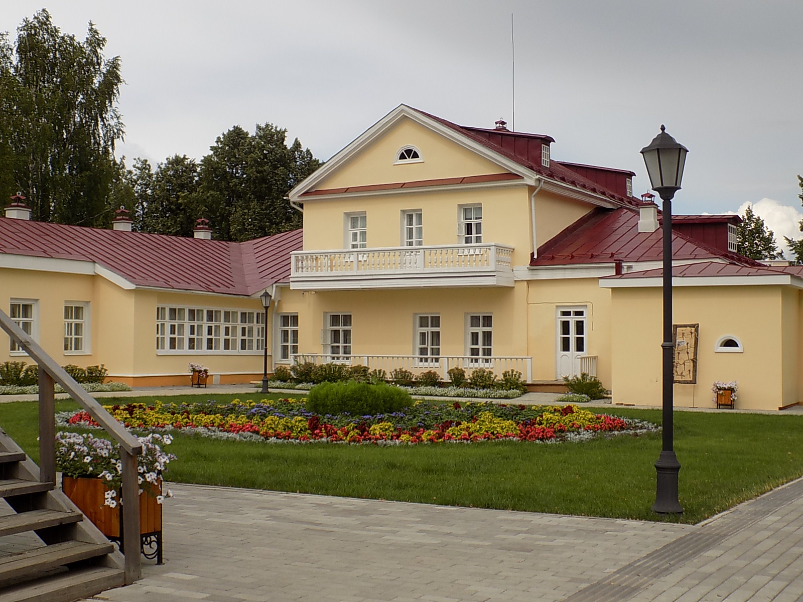 Дом горного начальника (дом, в котором родился П.И. Чайковский в 1840 году): улица Чайковского, 119, Воткинск, Удмуртия